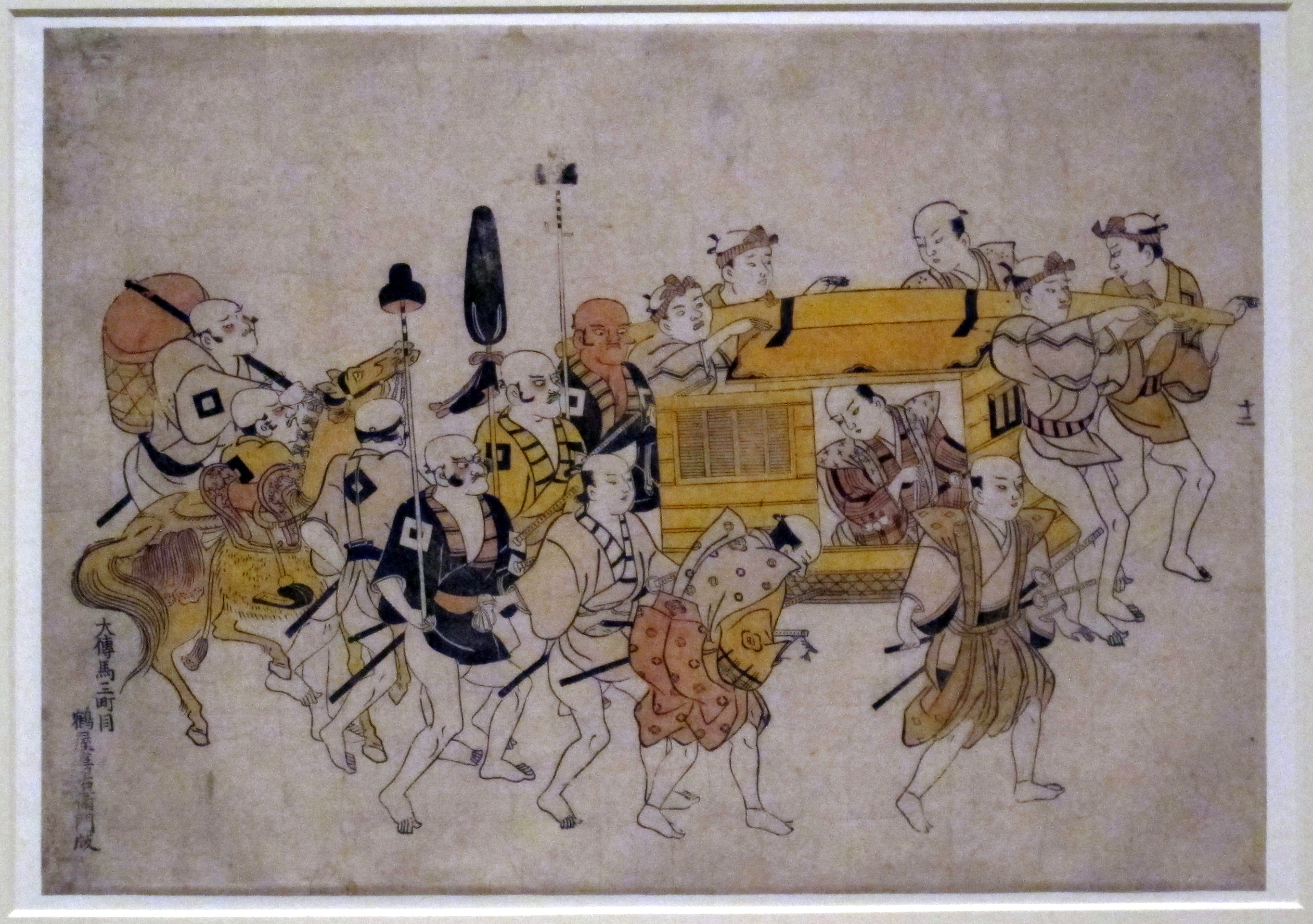 Okumura masanobu, processione di ambasciatori coreani in giappone, 1711